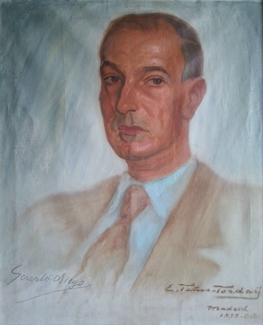 Gerardo Diego, Emeric Tauss Torday